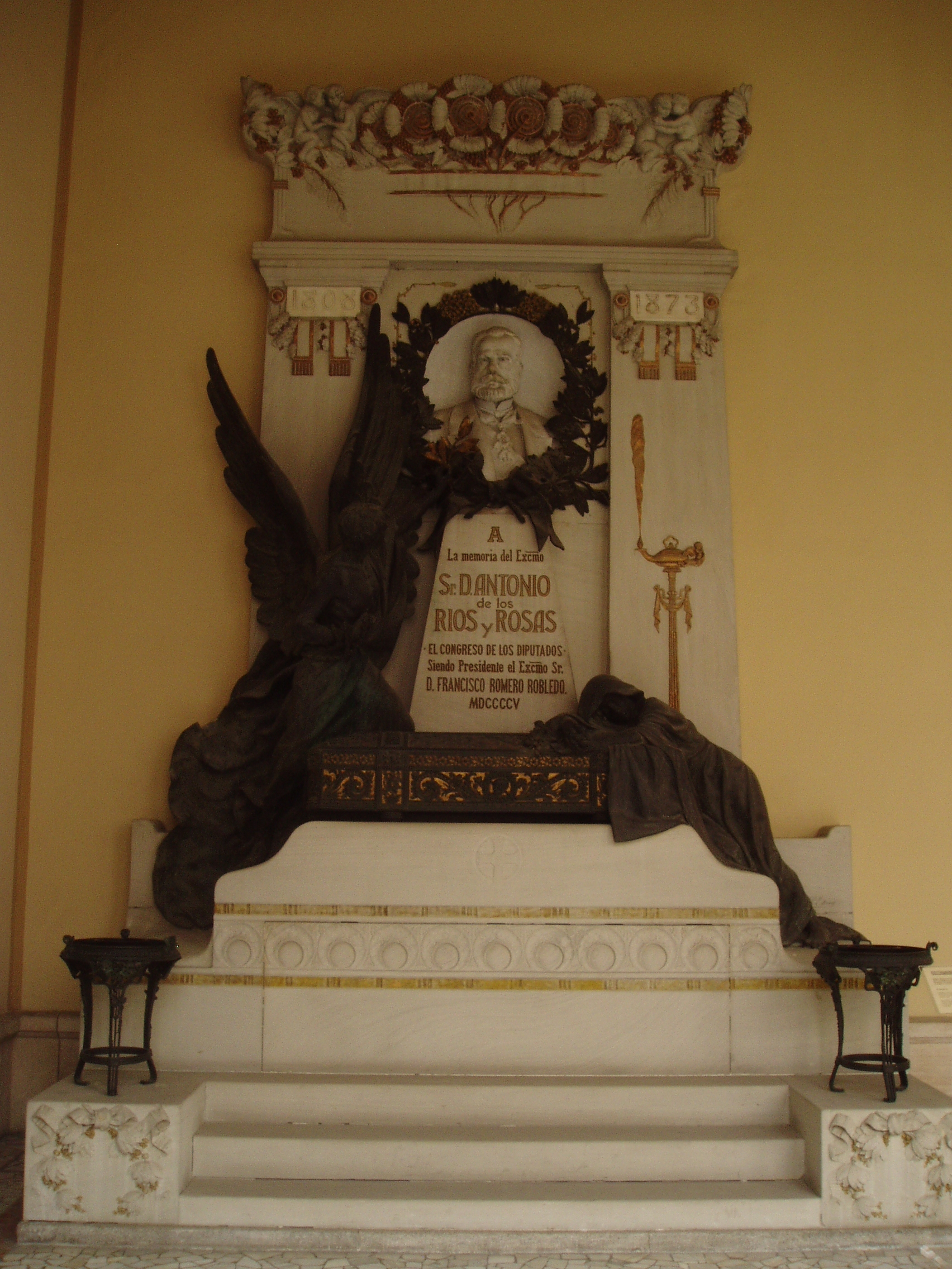 Ríos Rosas. Panteón de Hombres Ilustres. Madrid. España.